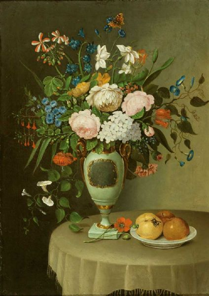 Auf einem runden Tisch steht eine Seladonvase mit prachtvollem Blumenstrauß, u.a. mit Hortensien, Rosen und Chrysanthemen, daneben ein Teller mit Früchten und einer Hummel